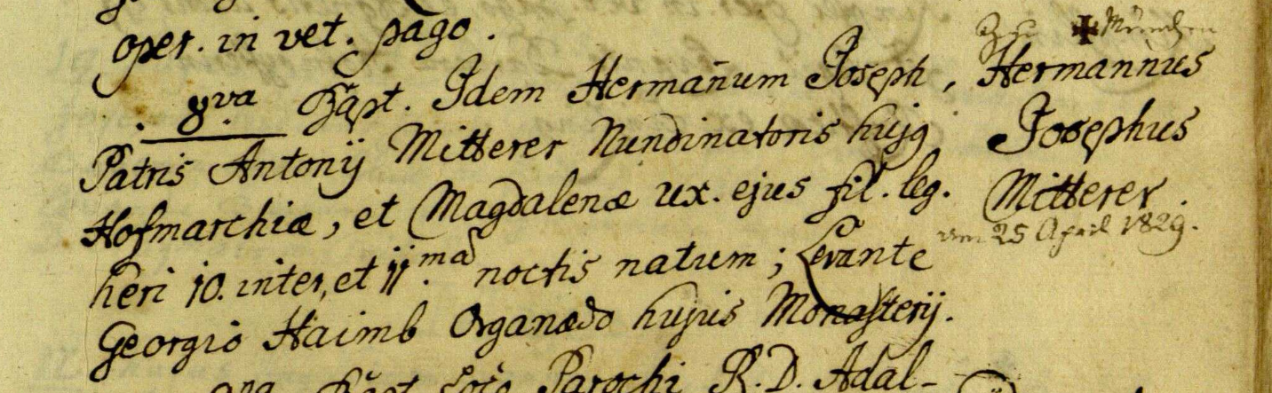 Geburtseintrag von Hermann Mitterer im Kirchenbuch des Klosters Altenmarkt bei Osterhofen